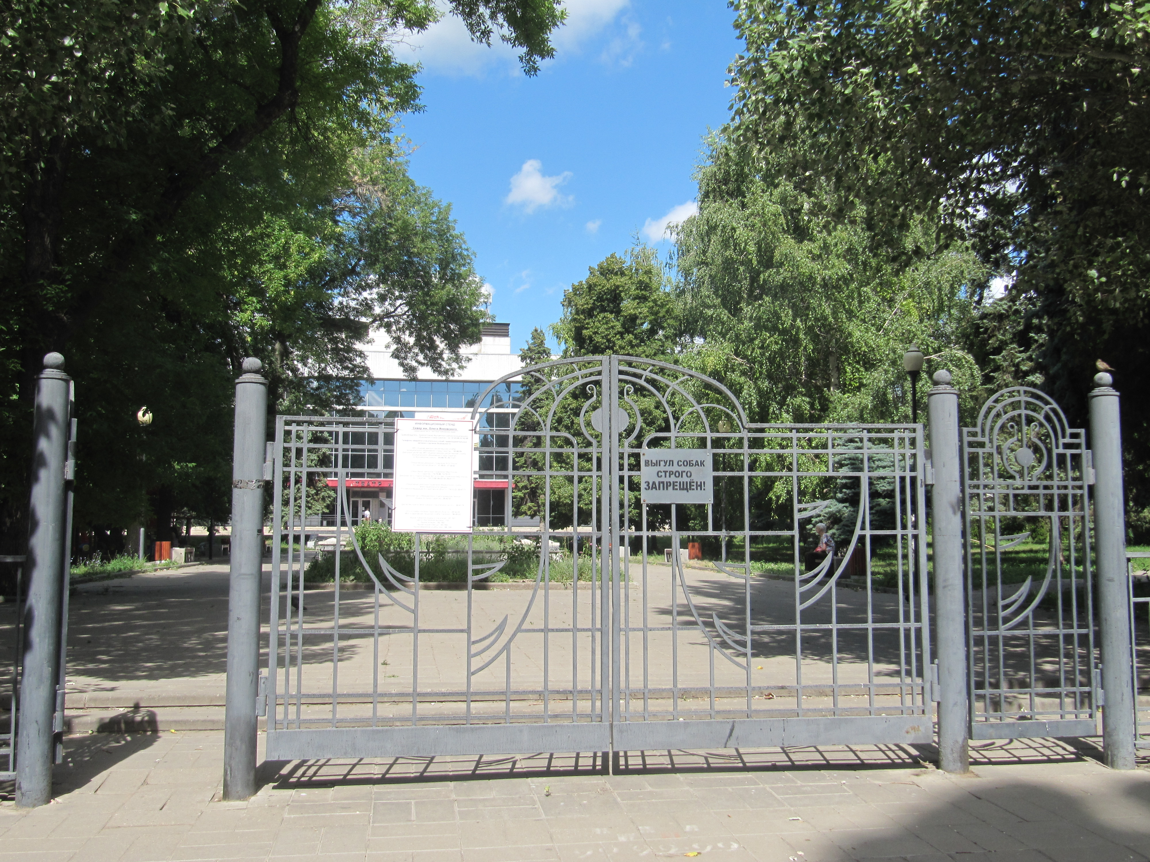 Ворота Сквера имени Олега Янковского возле Театра драмы. Ворота на ул. Железнодорожная, Саратов.